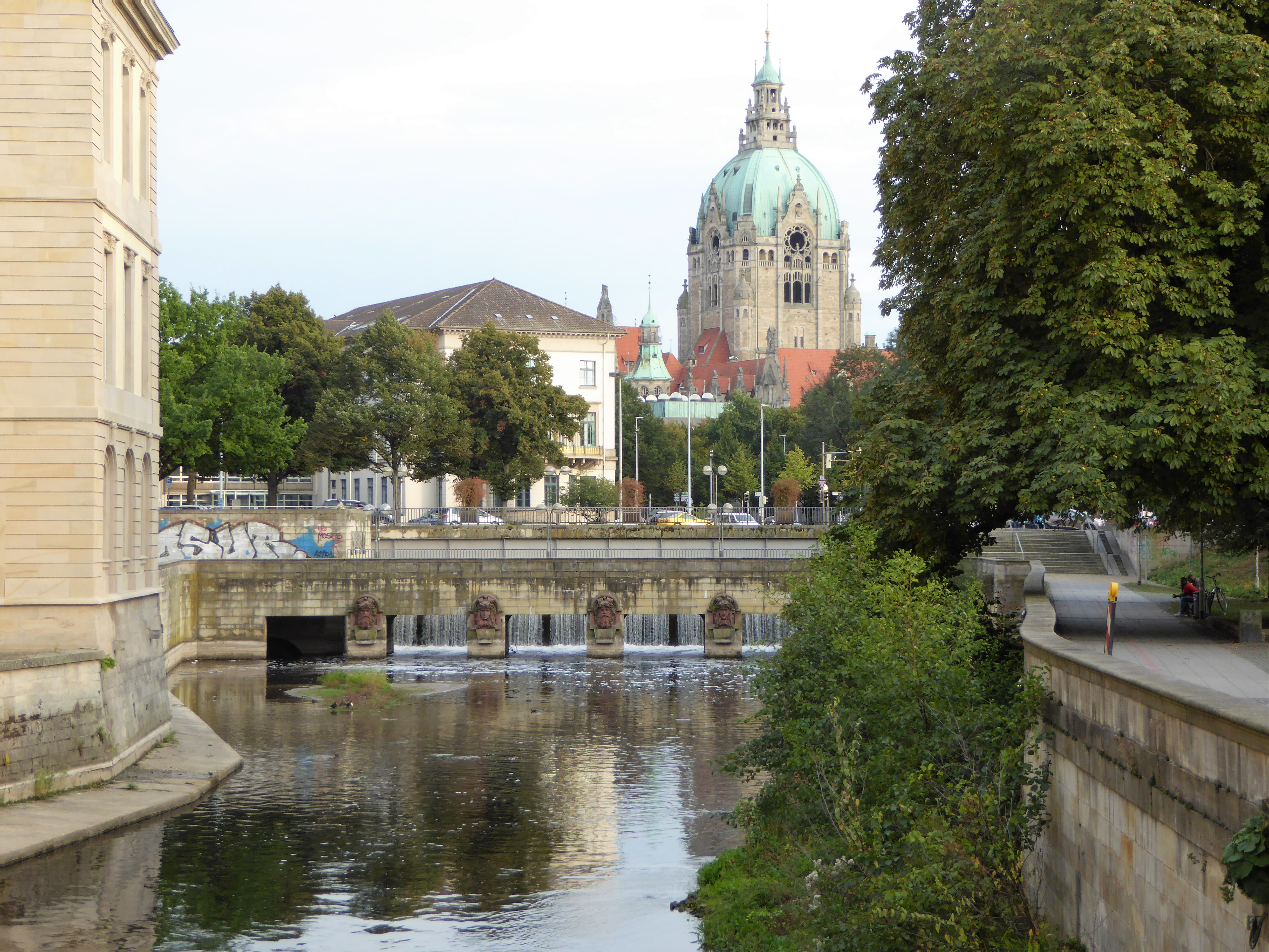 Neues Rathaus und Friederikenbrücke über den Klickmühlenarm im Vordergrund